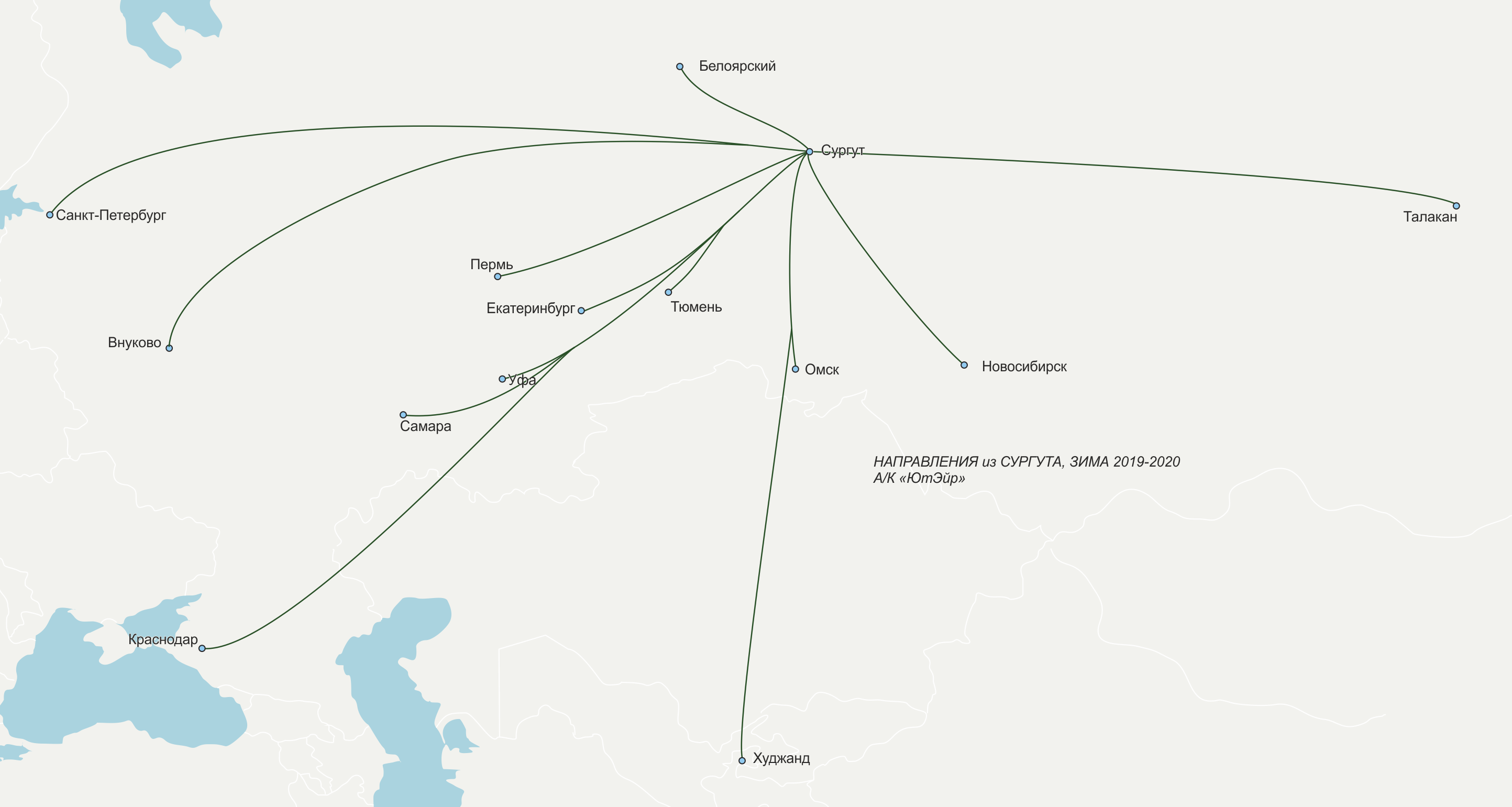 по расписанию зима 2019-2020